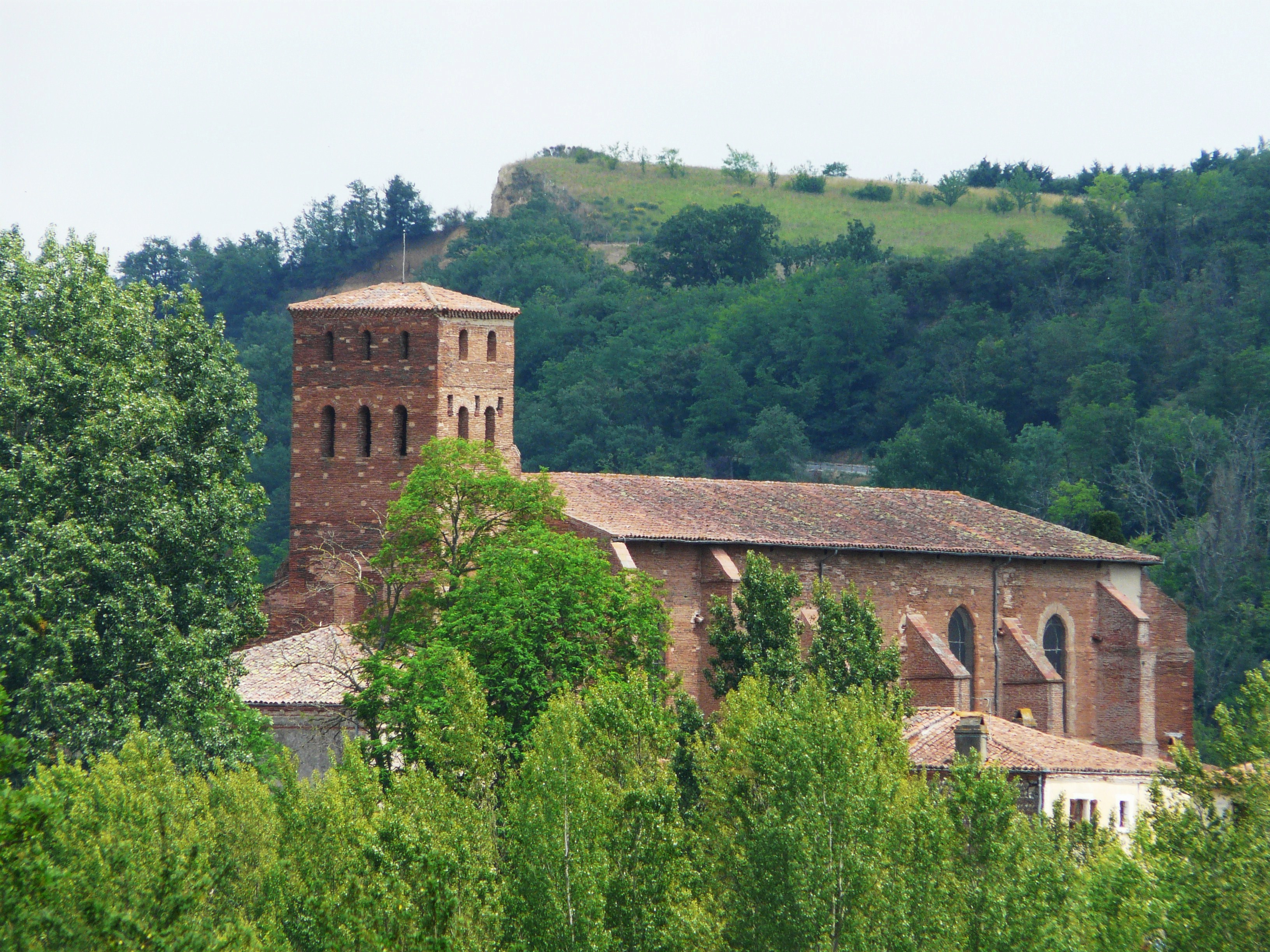 L'église Saint-Laurent vue depuis le sud-ouest, Carbonne, Haute-Garonne, France.